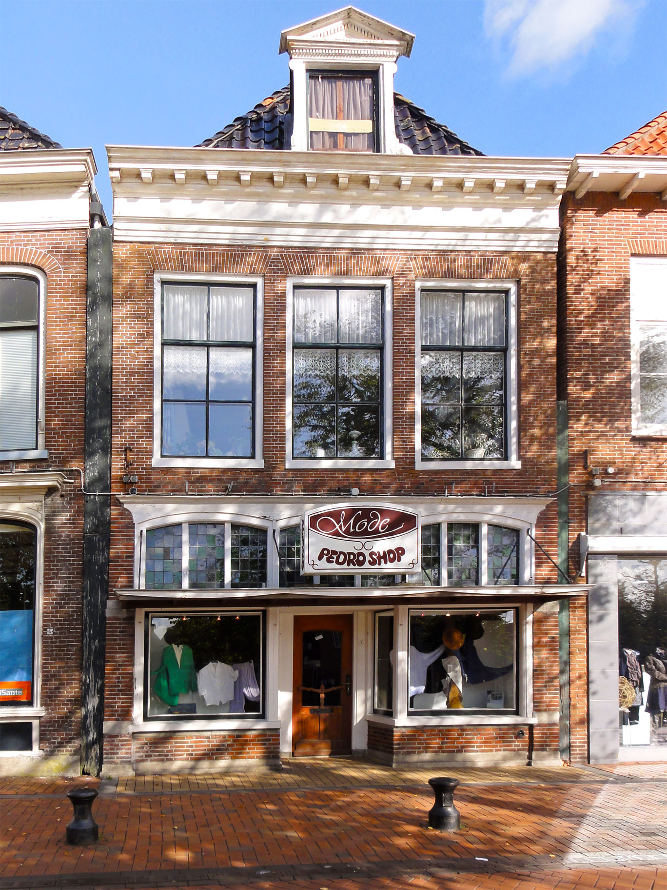 Diepswal 7 Dokkum. rijksmonument